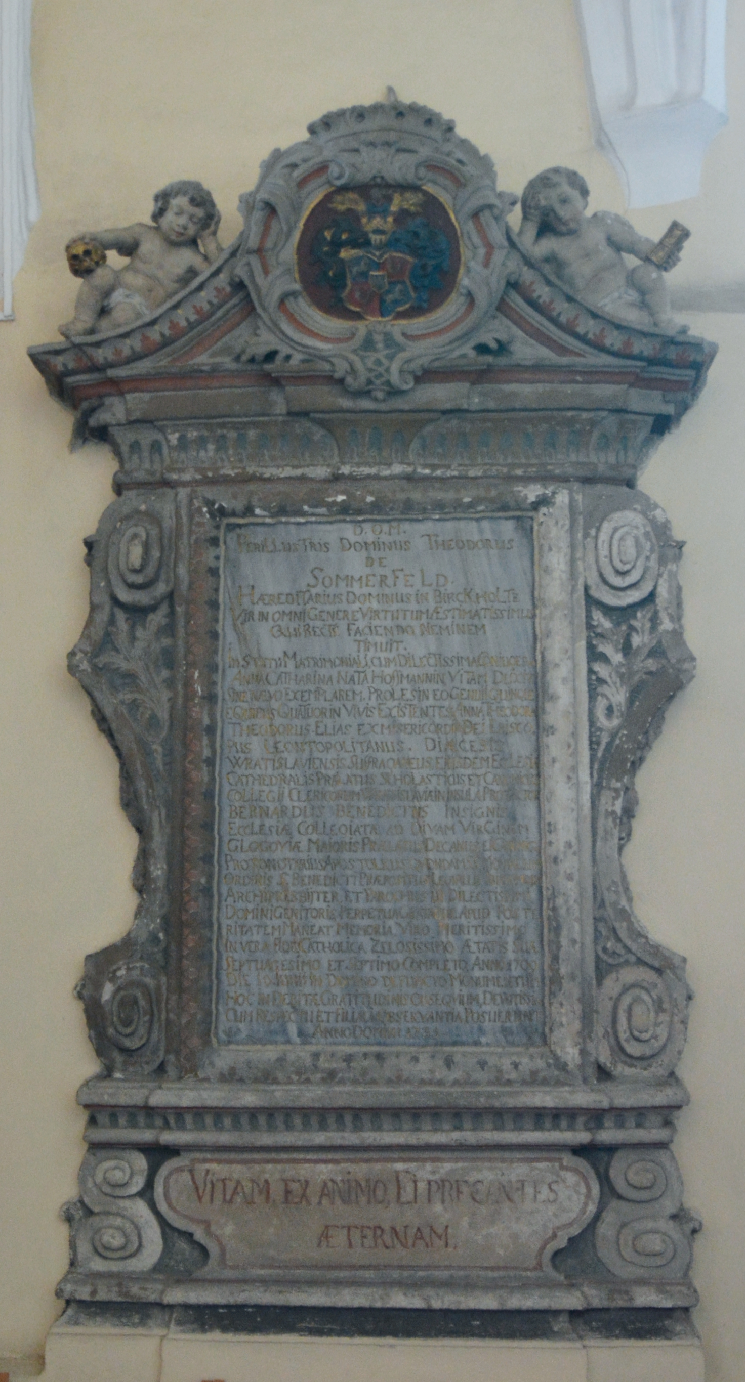 Kościół p.w. św. Michała Archanioła w Świebodzinie